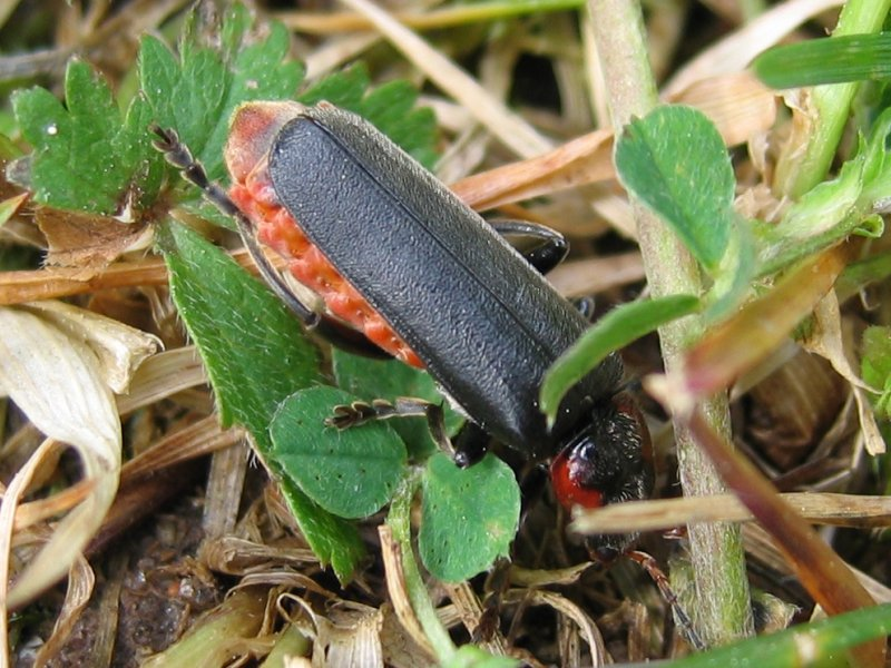 Gemeiner Weichkäfer Cantharis fusca